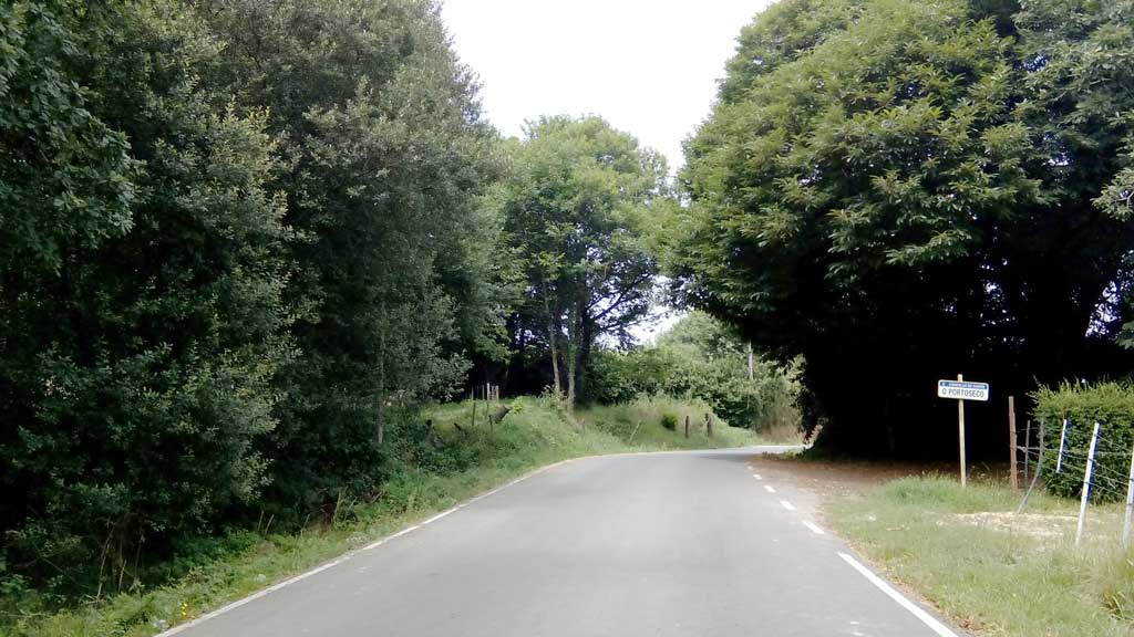 Vista de Portoseco, Curtis.